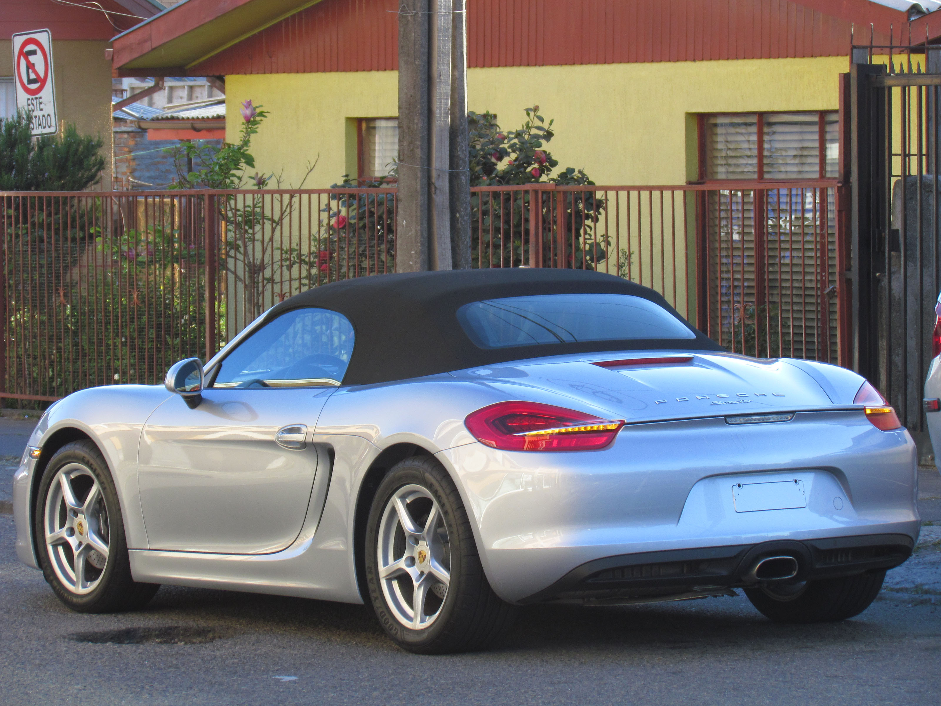 Porsche Boxster 2014